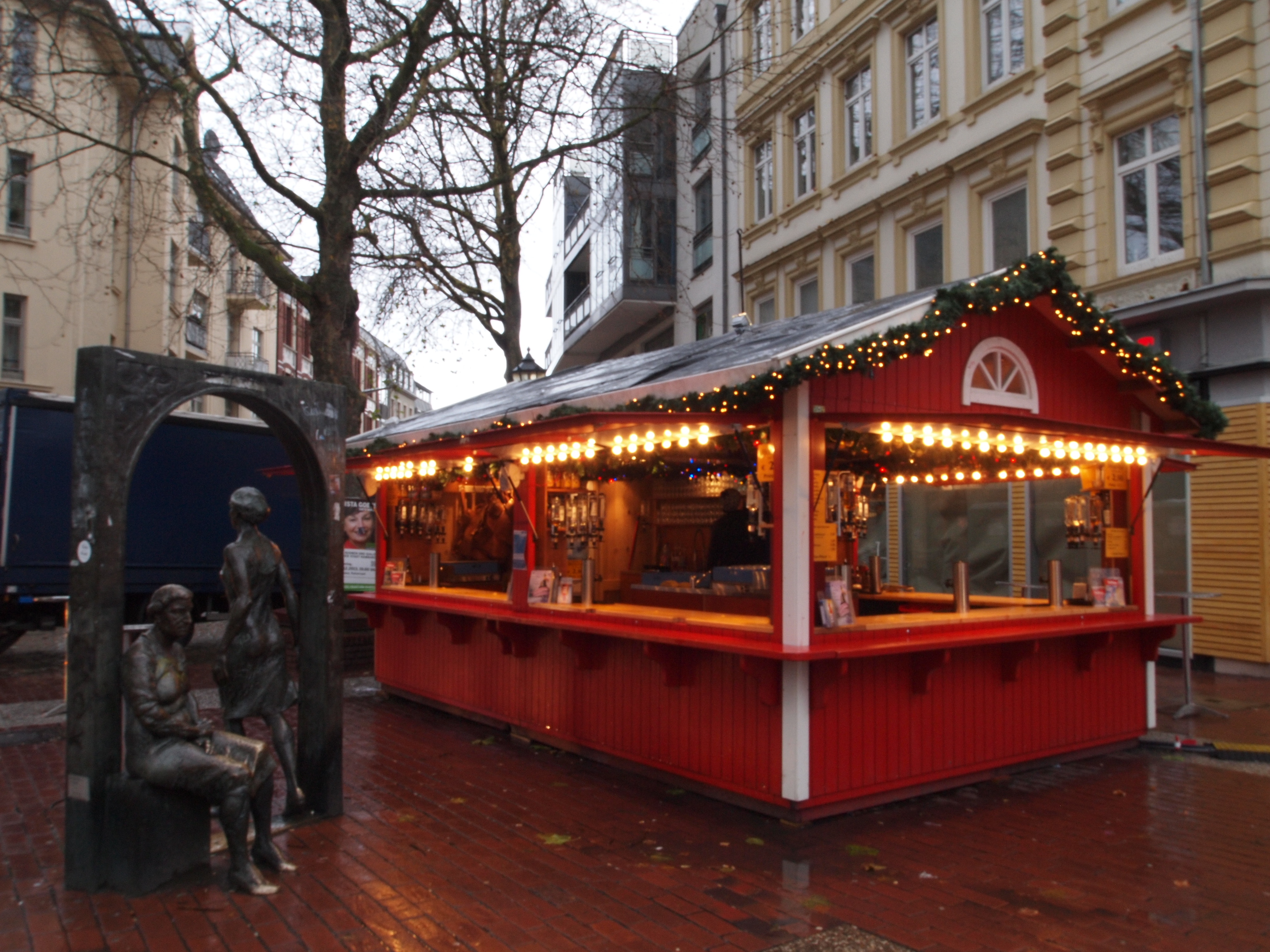 Glühweinstand auf dem Ottensener Weihnachtsmarkt Hamburg-Altona (Tallinn in Altona: estnischer Glühwein)